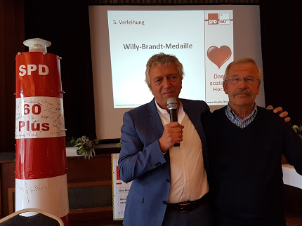 Für besondere Verdienste bei der AG SPD 60plus hatte Kurt Kallert die Willy-Brand-Medaille von Rainer Spiering (MdB) überreicht bekommen